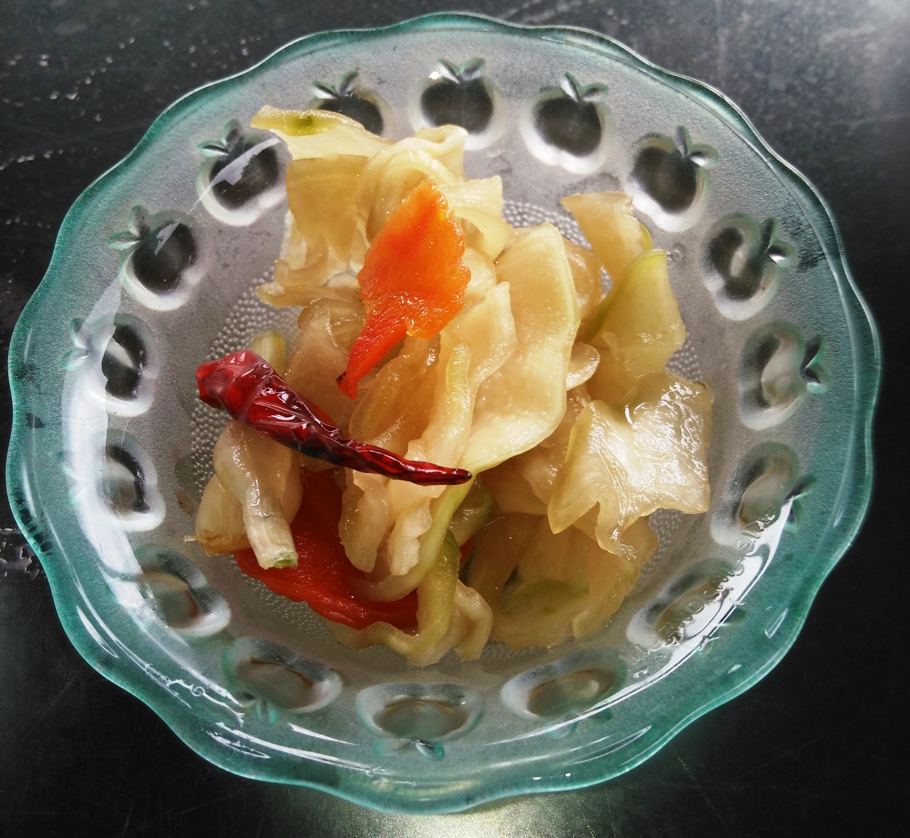 Dưa món Công Đoàn Quảng Trị, Tết 2018